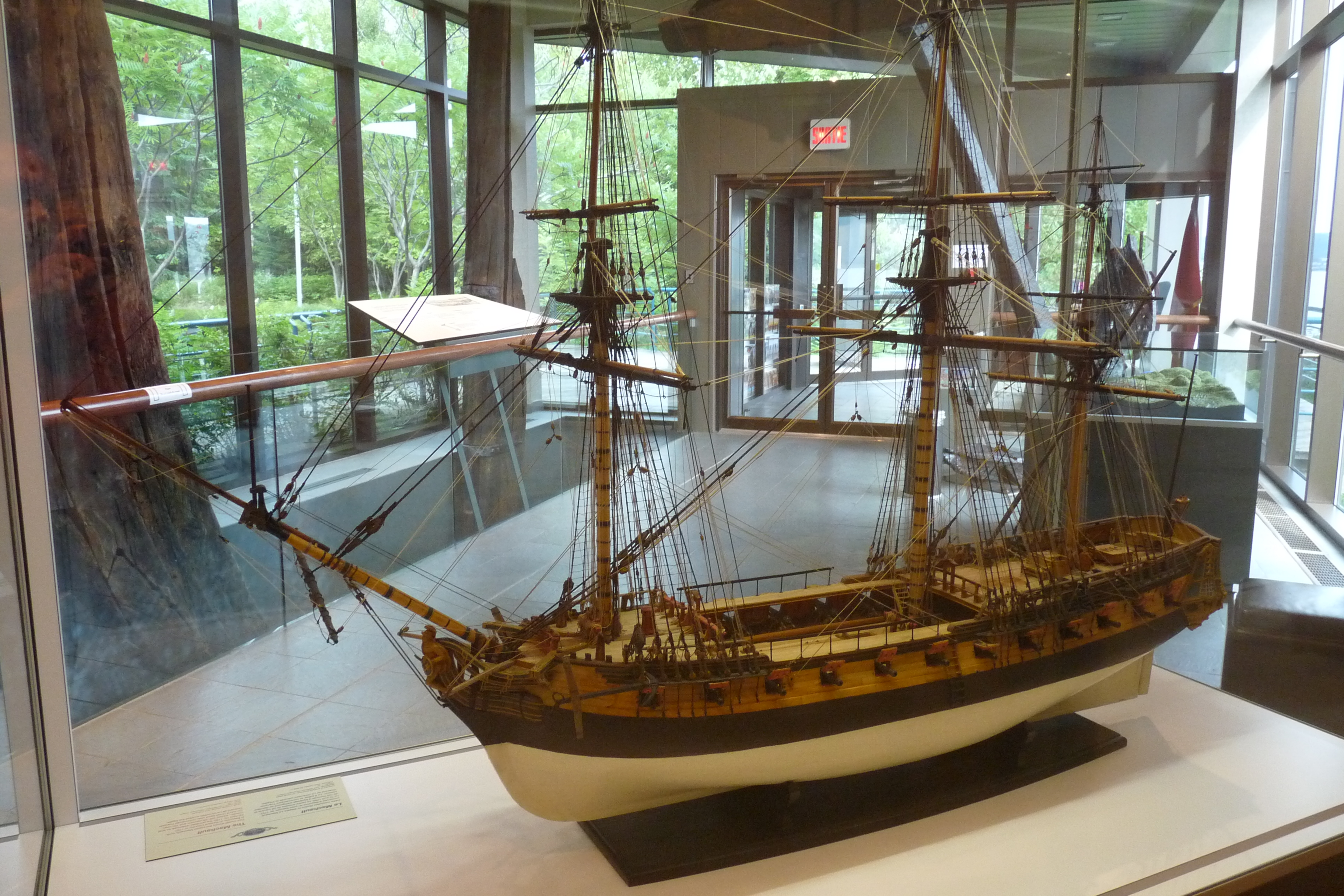 Maquette de la frégate Le Machault dans le hall du centre d'interprétation de la Bataille de la Ristigouche